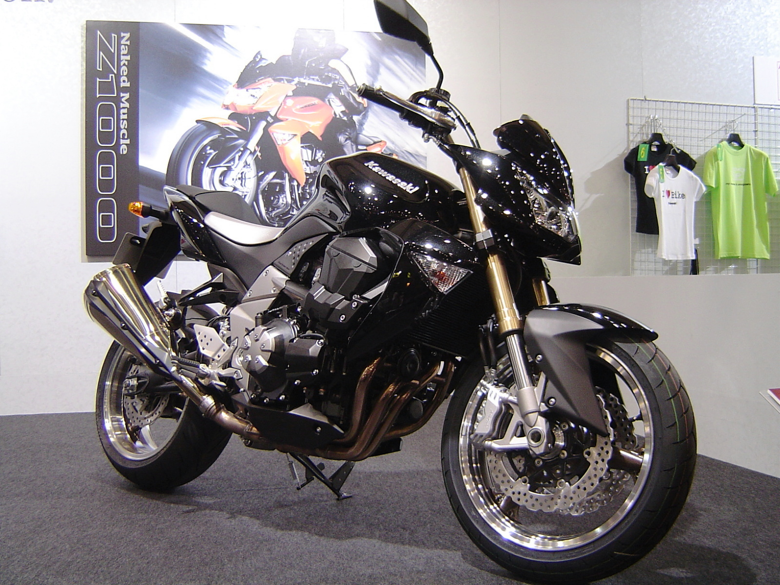 Kawasaki Z1000 2007(2007 Tokyo Motorcycle Show)